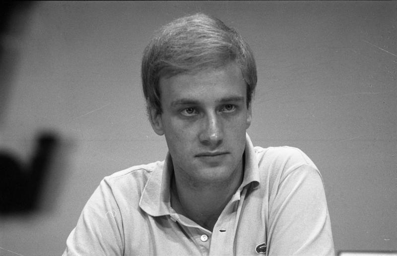 2.-5.11.1981 30. Bundesparteitag der CDU in Hamburg im Congress Centrum